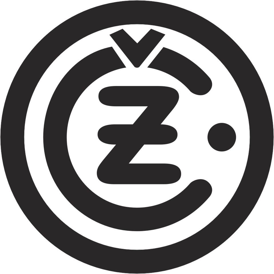 Markenzeichen Motorräder CZ